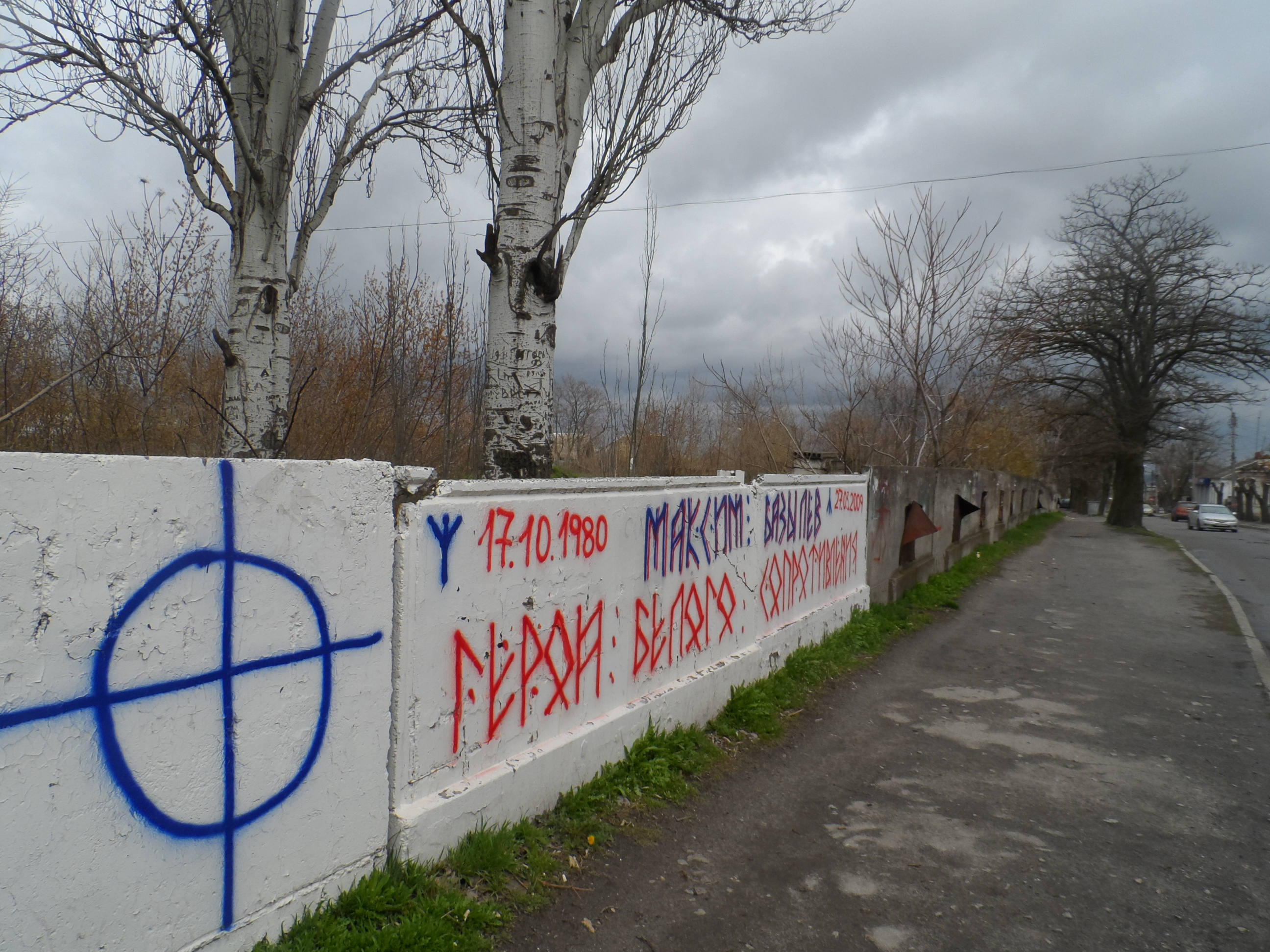 Граффити в память о российском национал-социалисте Максиме Базылеве в Мариуполе